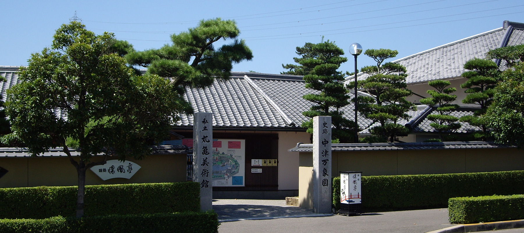 中津万象園（入口） - 日本国香川県丸亀市